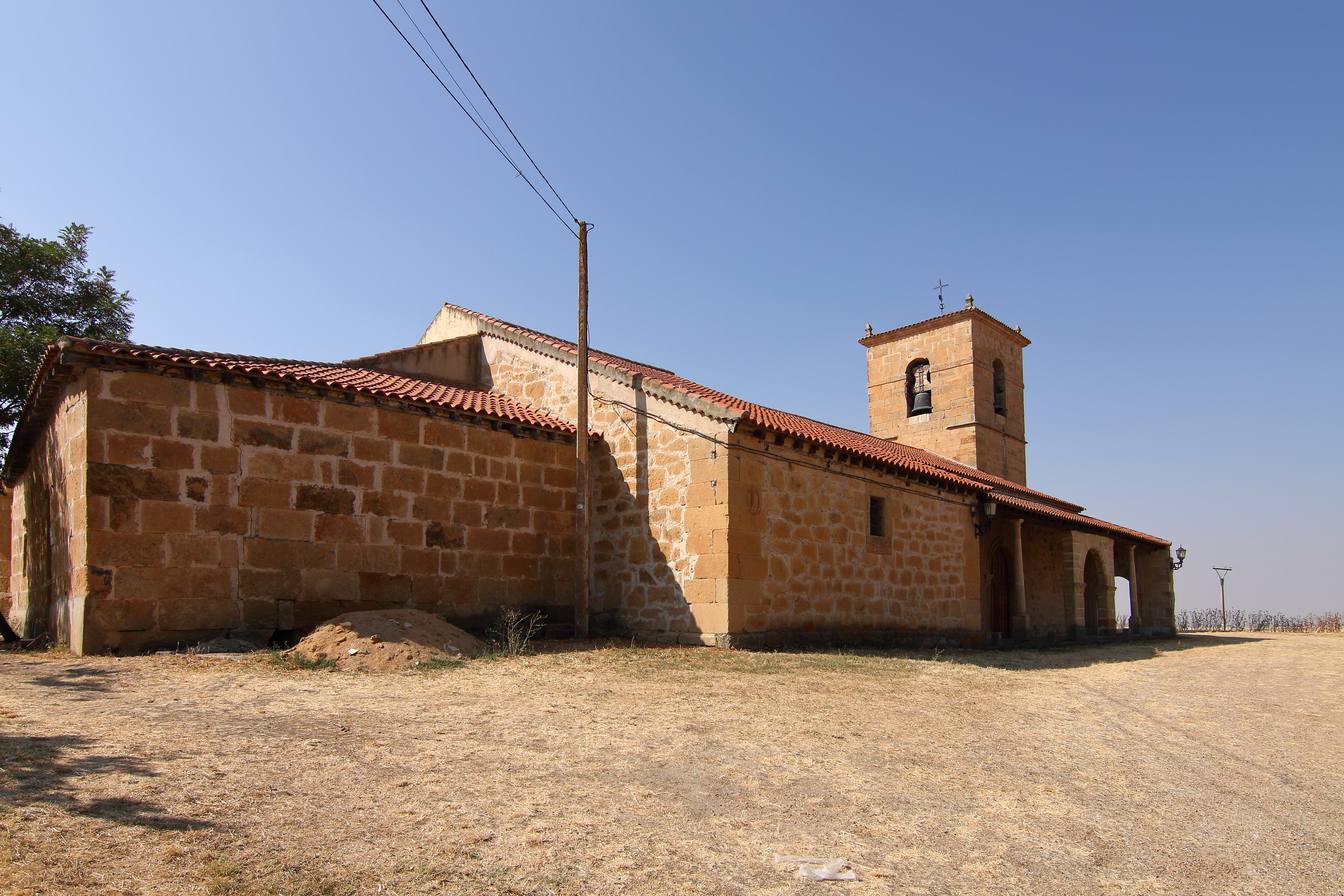 Iglesia Parroquial de Pedrosillo el Ralo